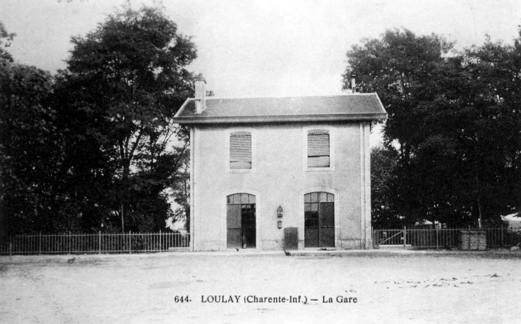 La gare de Loulay vers 1900, avec son bâtiment voyageurs d'origine.